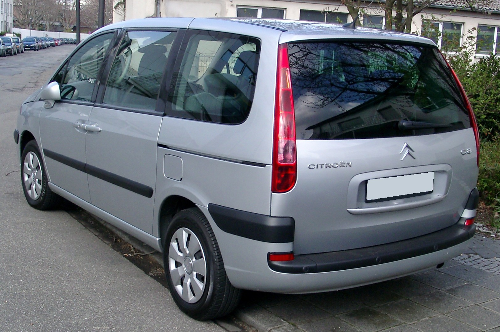 Citroen C8